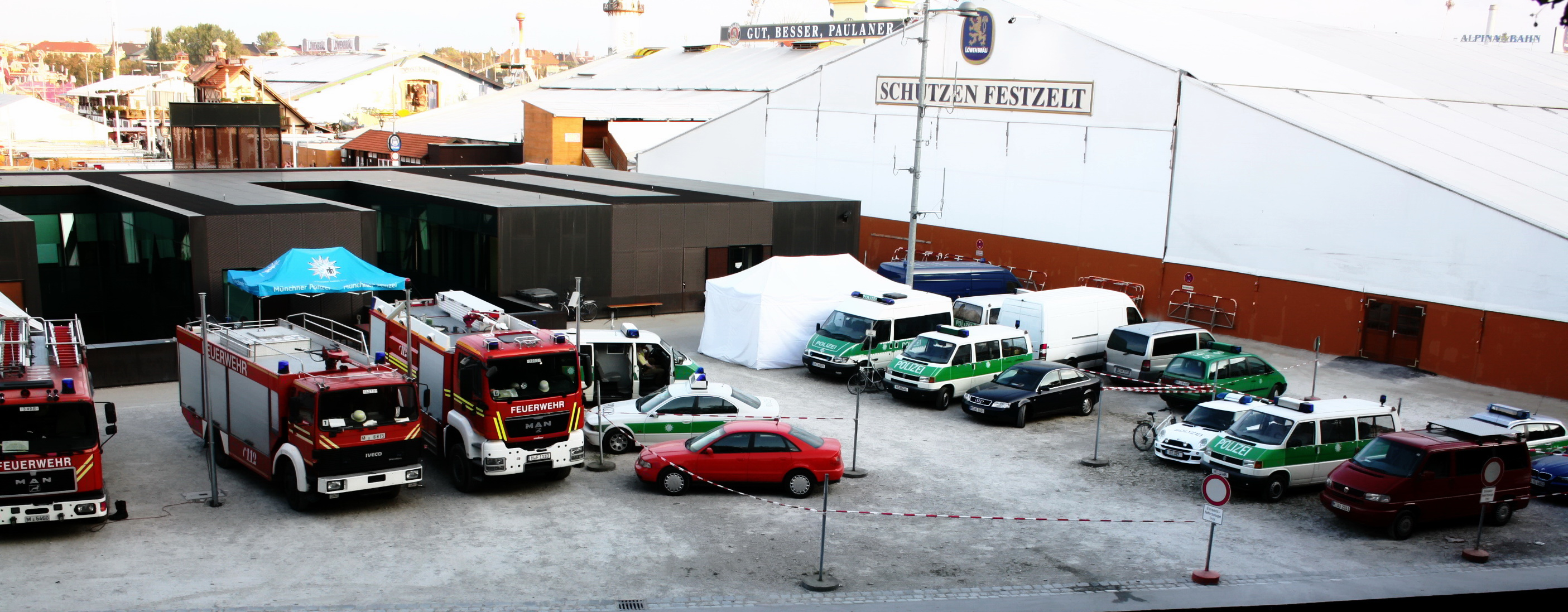 Behördenhof auf dem Oktoberfest. Feuerwehr, Polizei, Rettungsdienste und weitere Einrichtungen der Stadt sind hier während der Oktoberfestzeit untergebracht.